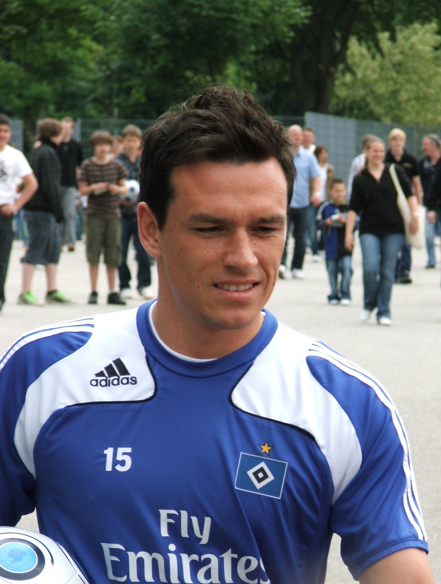 Piotr Trochowski vor dem Mannschaftstraining des Hamburger Sport-Verein e.V.